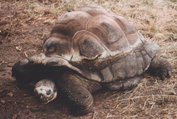 Riesenschildkröte Fotografiert: selbst